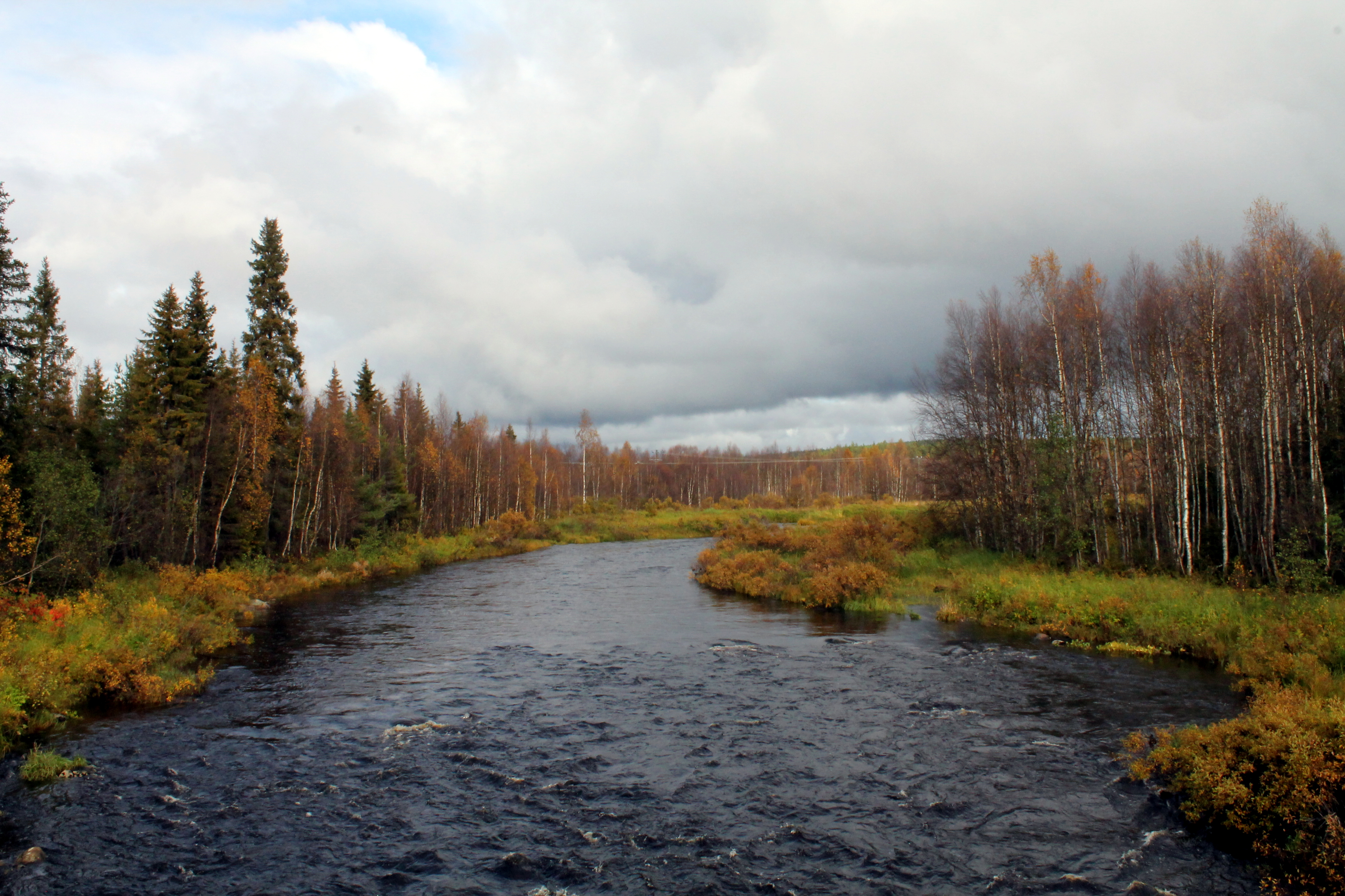 Käsmäjoen Tuurakoski Kursun kylässä.